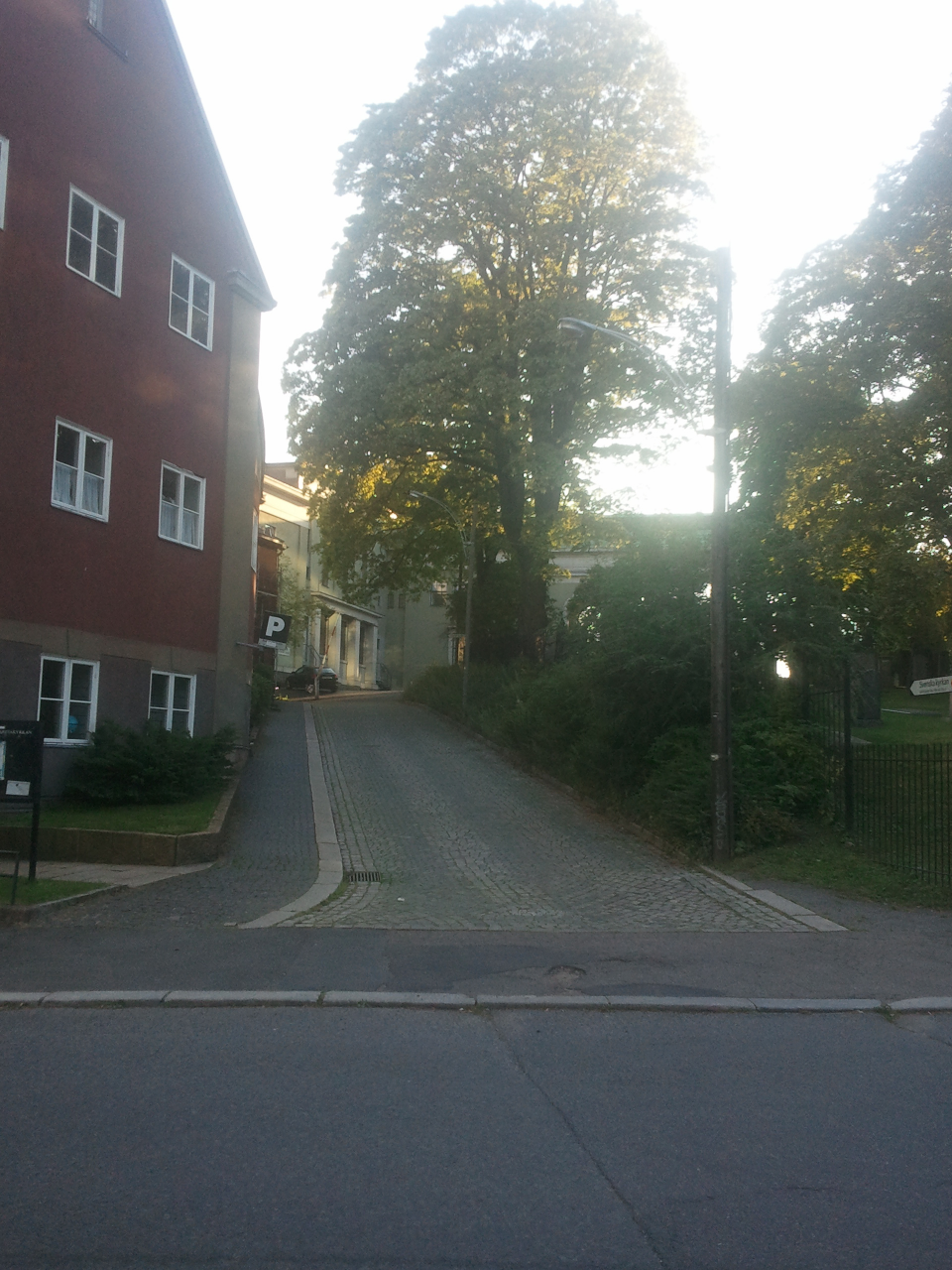 Restene av Kanten, sett fra den nyere Grubbegata. Krist kirkegård til høyre, Svenska Margaretakyrkan til venstre.